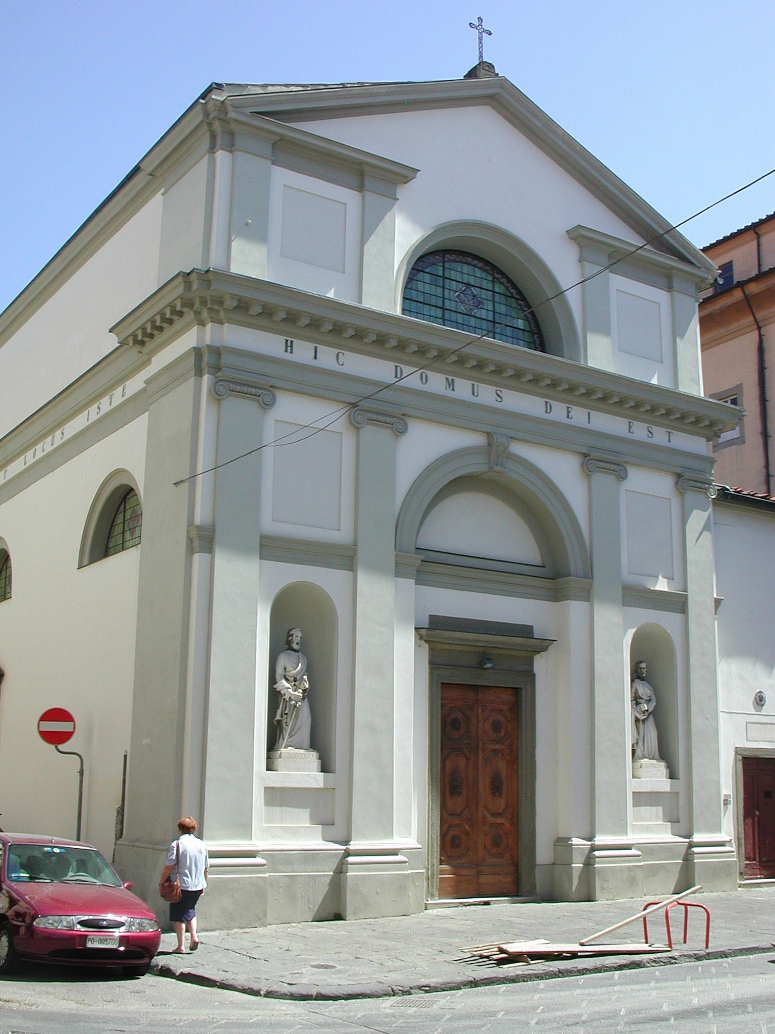 Chiesa San Pier Forelli di Prato Source: photo uploaded by User:RicciSpeziari. Photographer: Riccardo Speziari